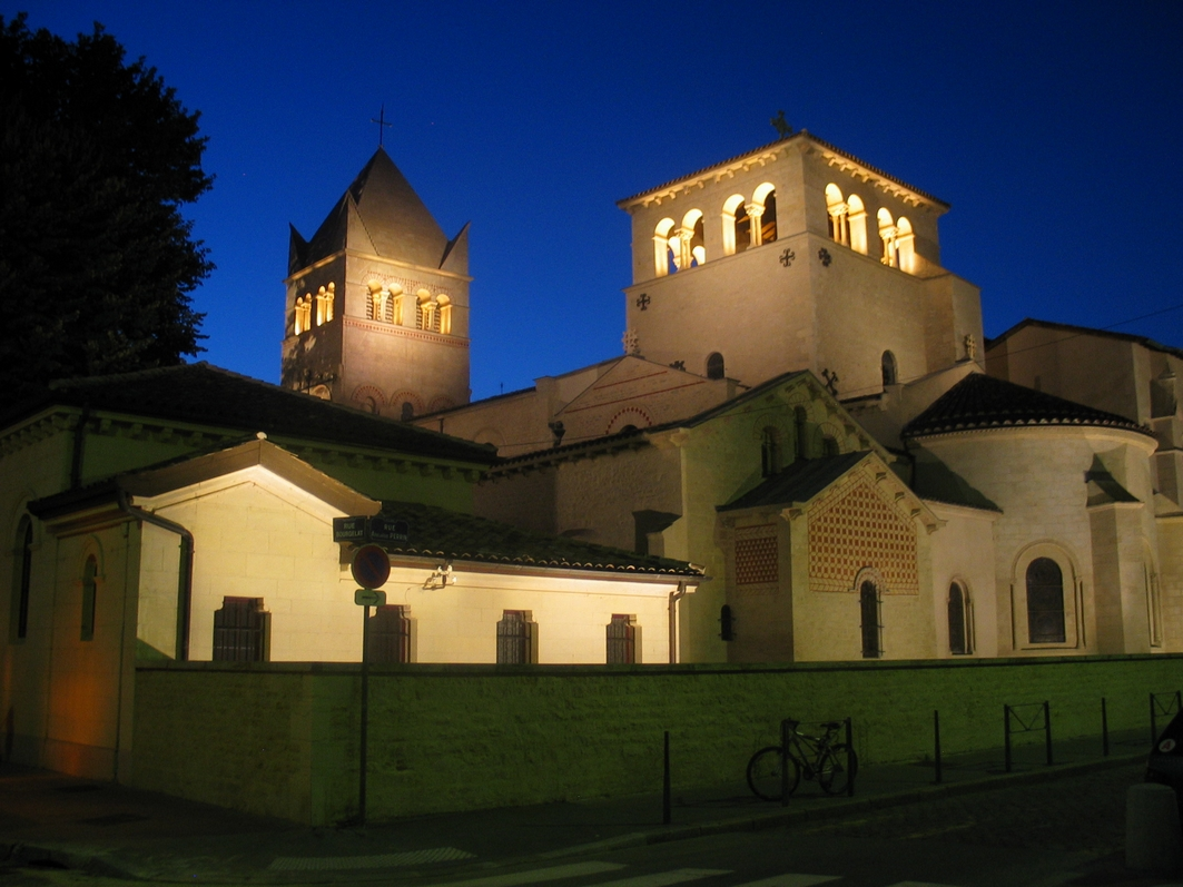 La basilique Saint-Martin-d'Ainay de Lyon